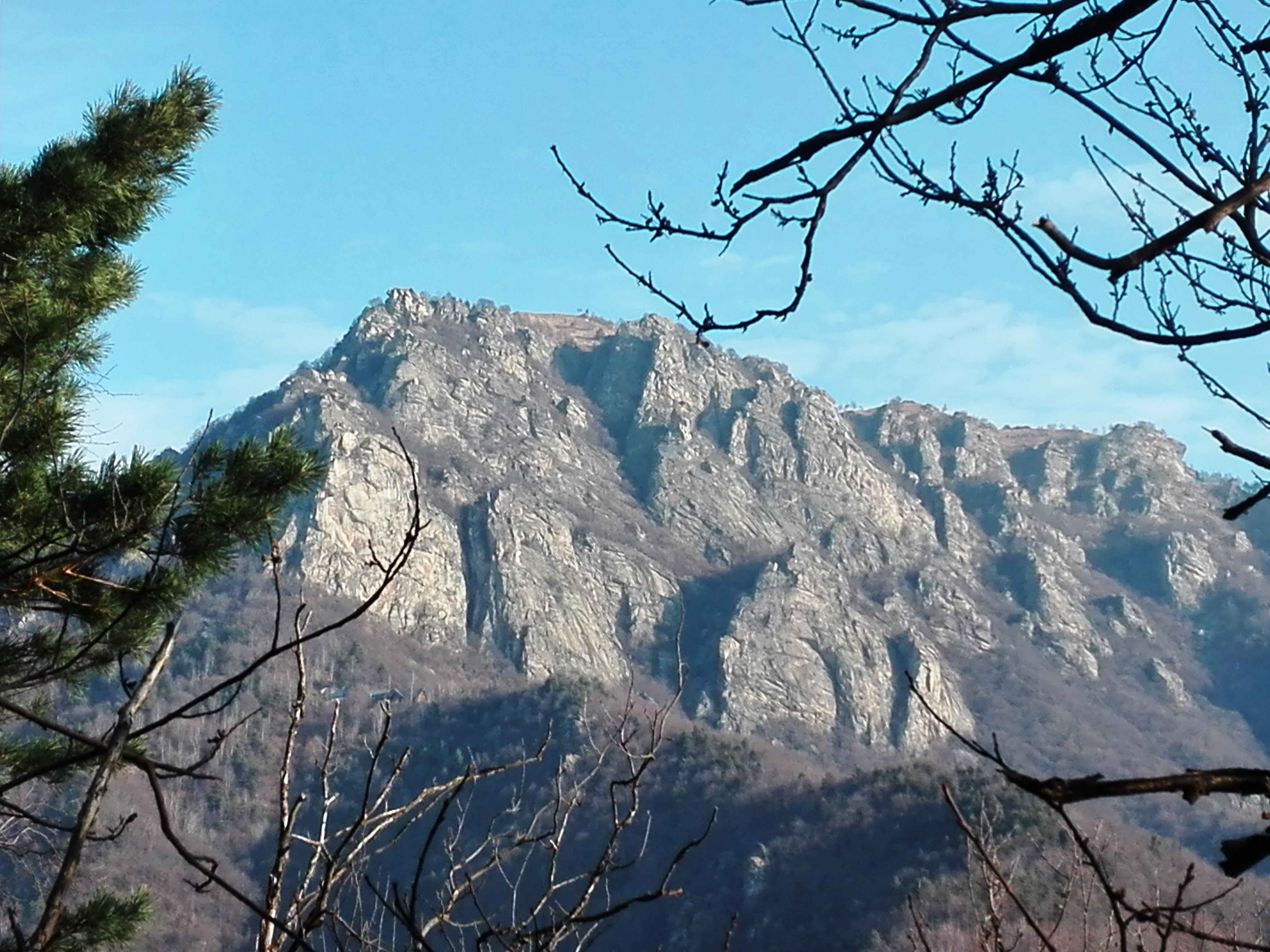 Il monte Freidour con ai piedi la palestra di roccia detta Rocca Sbarua